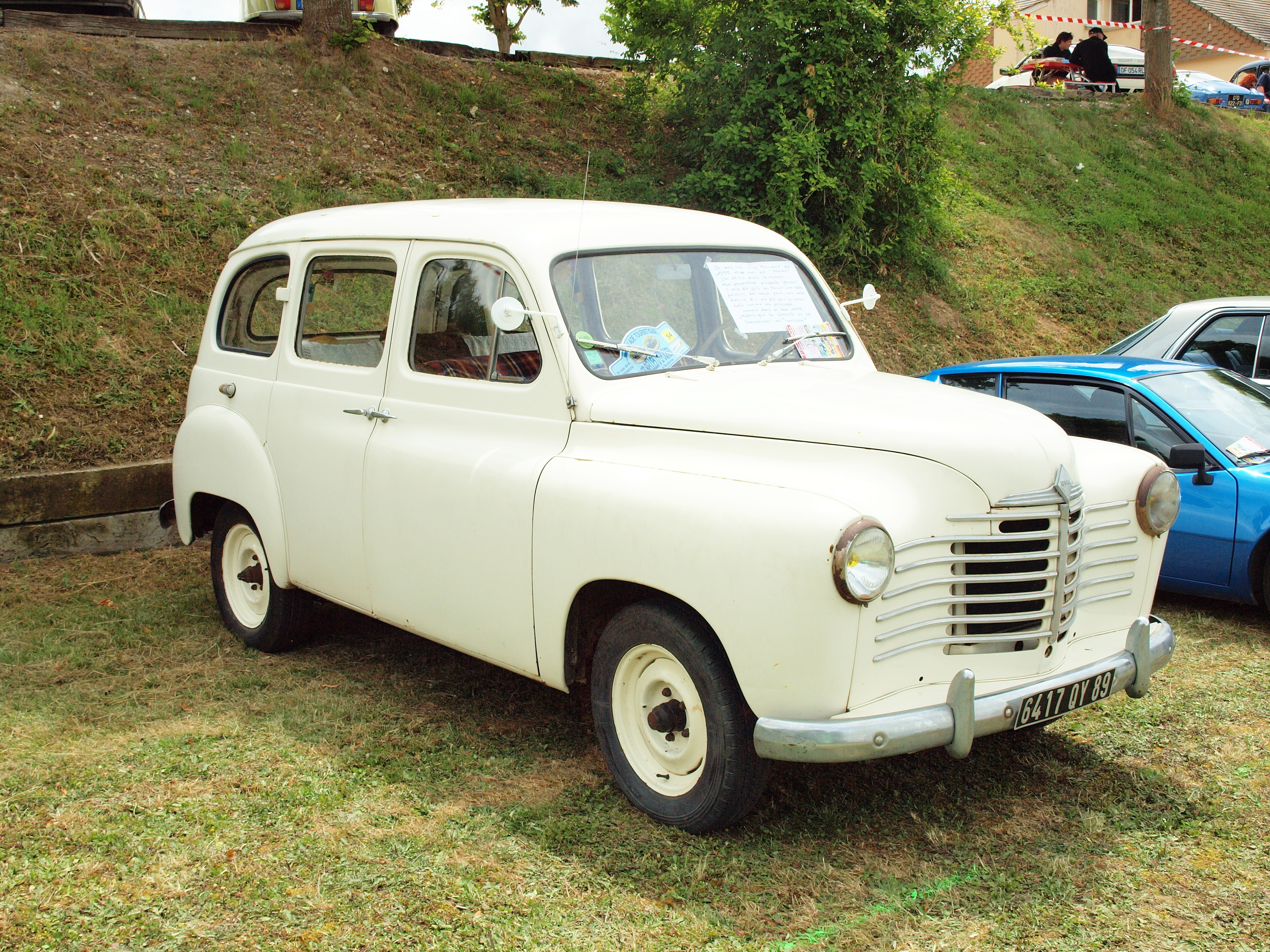 Rassemblement 2015 des véhicules anciens à Villemanoche; les véhicules exposés.